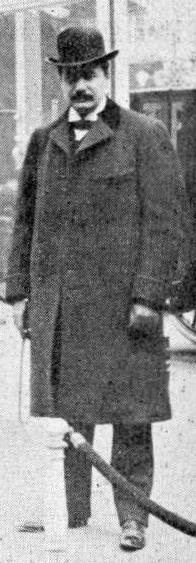 Louis Kriéger en 1902 (salon de l'automobile de Paris).